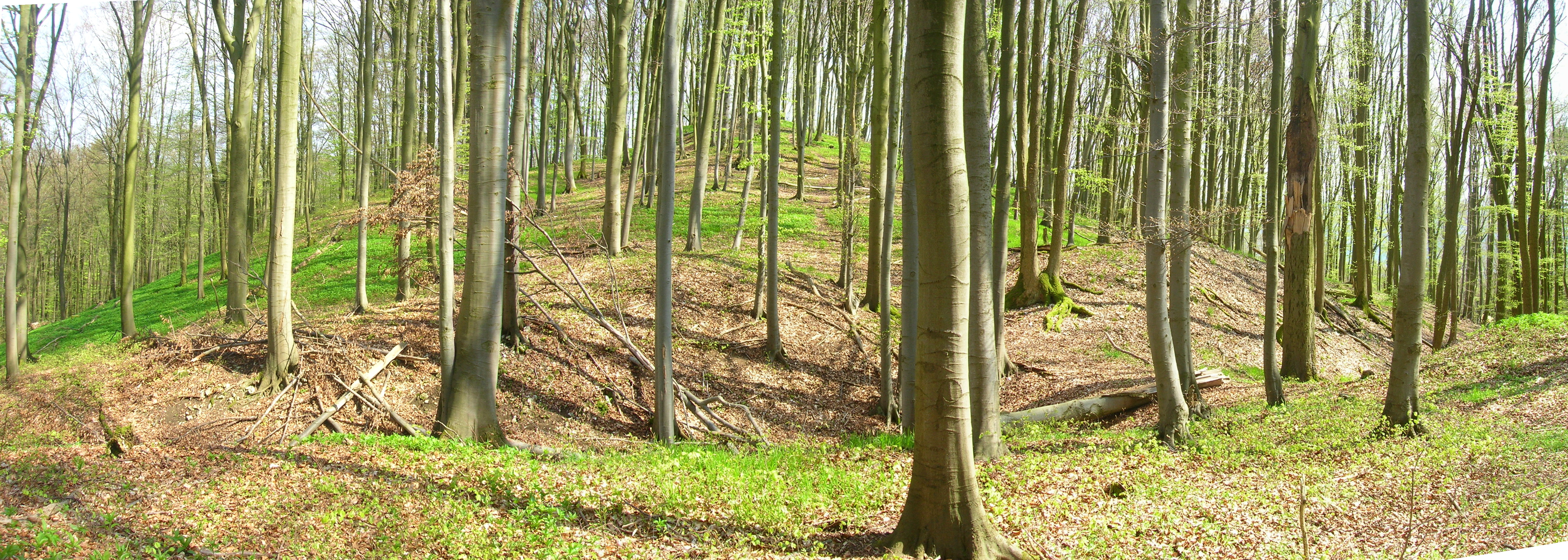 Panorama des Burgstalls Hansgörgel